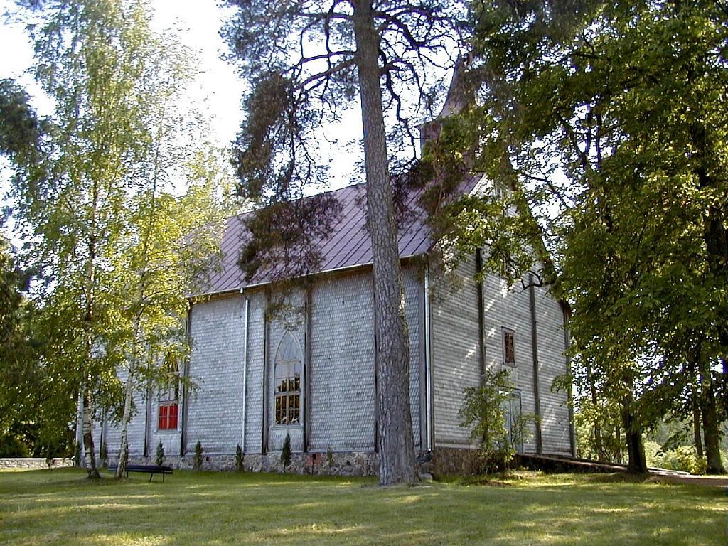 Vijciema luterāņu baznīca 2002-06-01